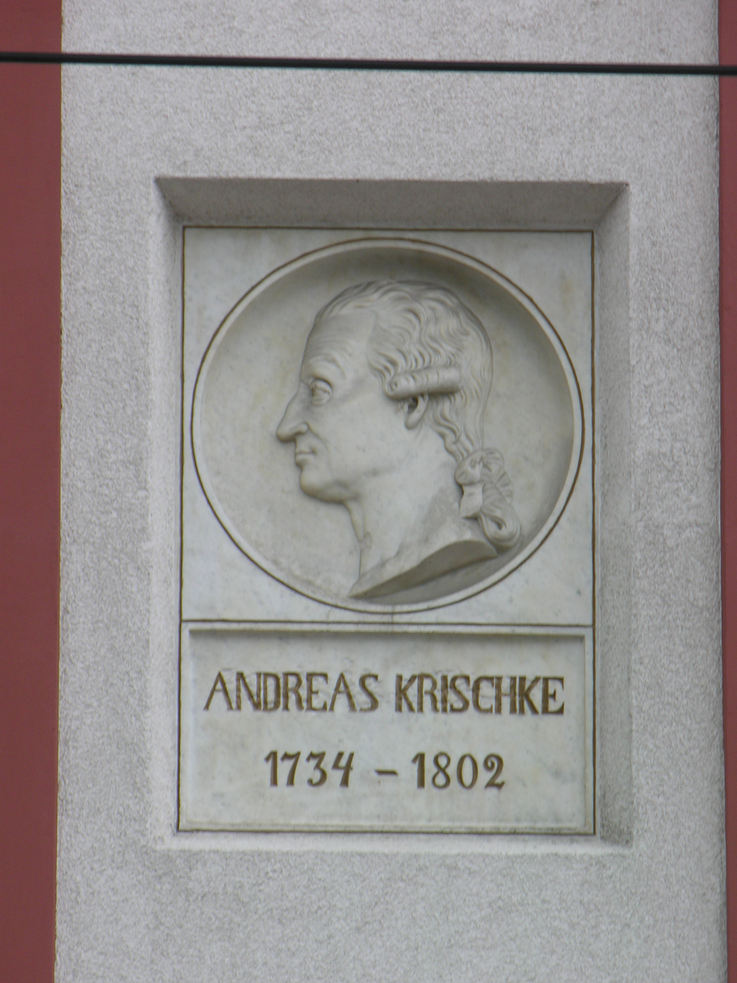 Tablica ku czci twórców Apteki Szpitala Wszystkich Śwetych we Wrocławiu przy ul. św. Mikołaja